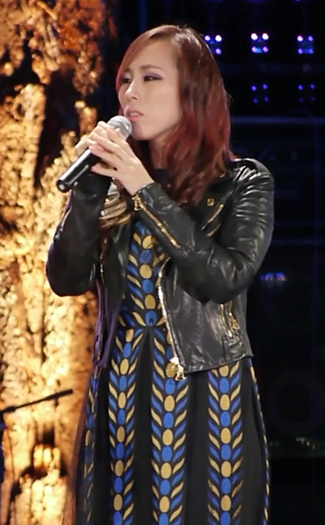 151009 횡성 한우 축제 서문탁 직캠 풀 버전